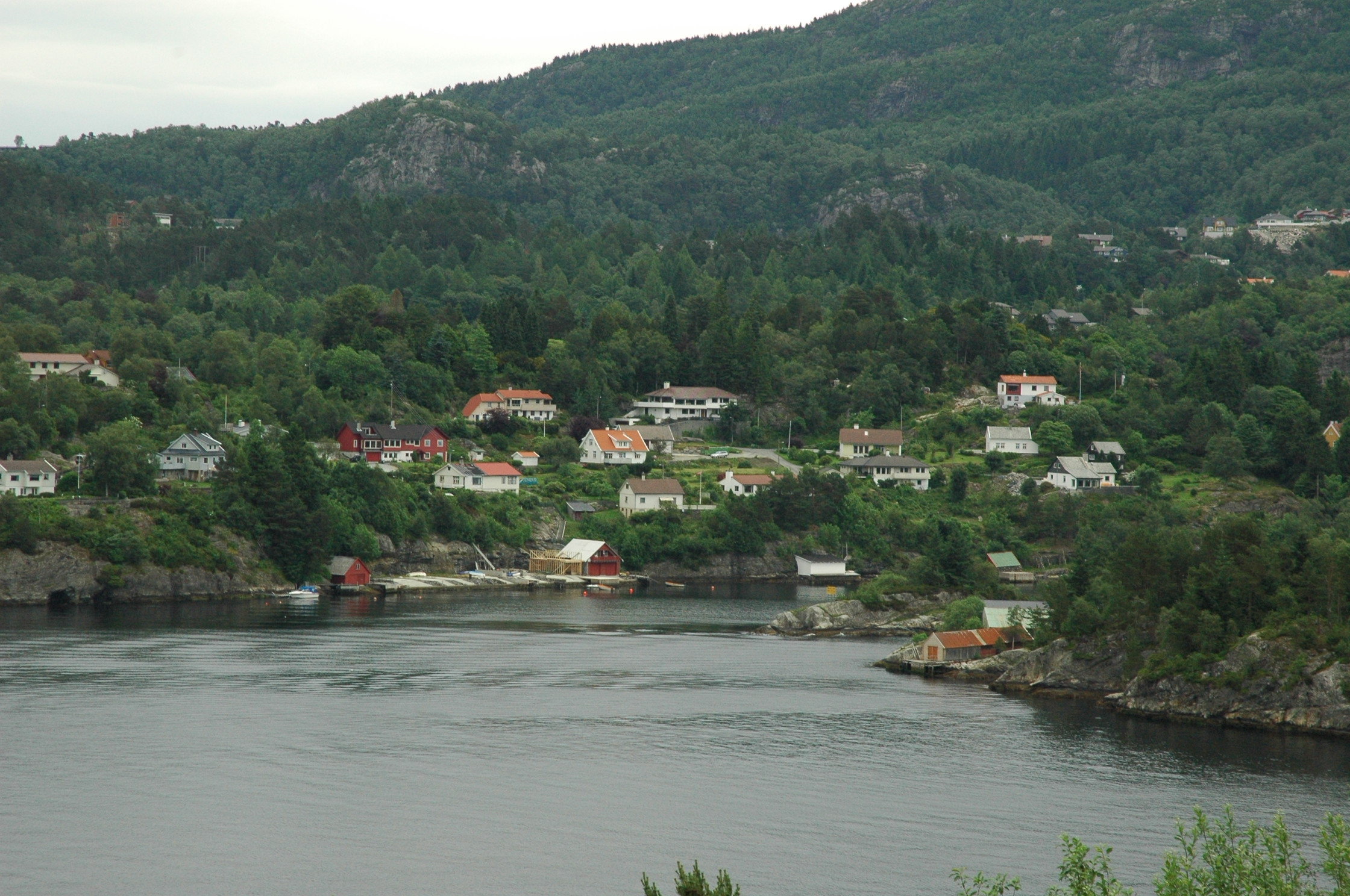 Eget bilde.Snekkerplassen på Åstveit